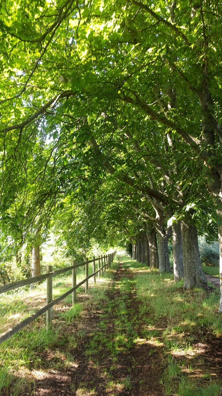 Es un paseo por la naturaleza, en Santo Domingo de la Calzada, un municipio español de la comunidad autónoma de La Rioja. Allí podrás encontrar numerosos árboles y matorrales, se encuentra a la izquierda del rio Oja.